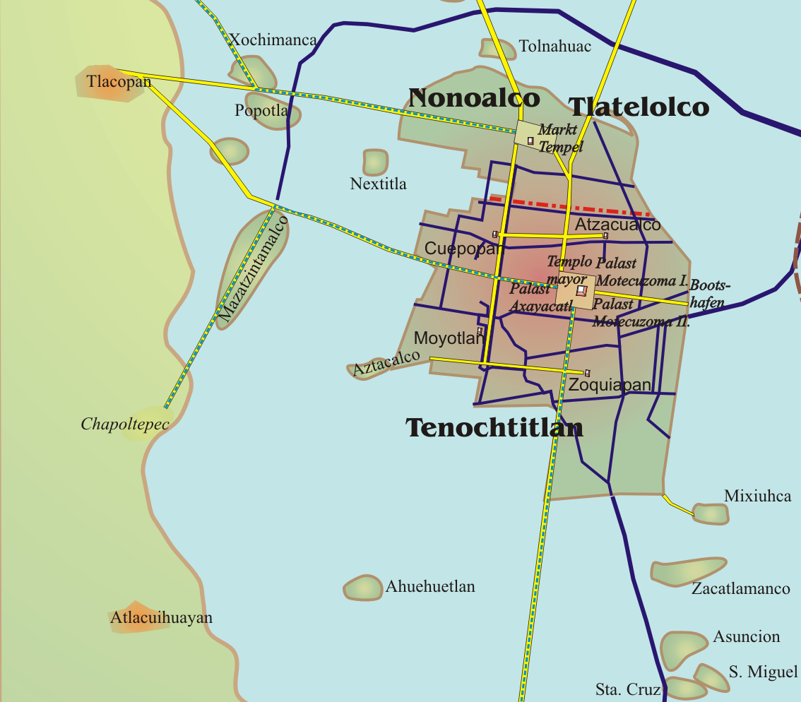 Tenochtitlan und westliches See-Ufer, Plan.